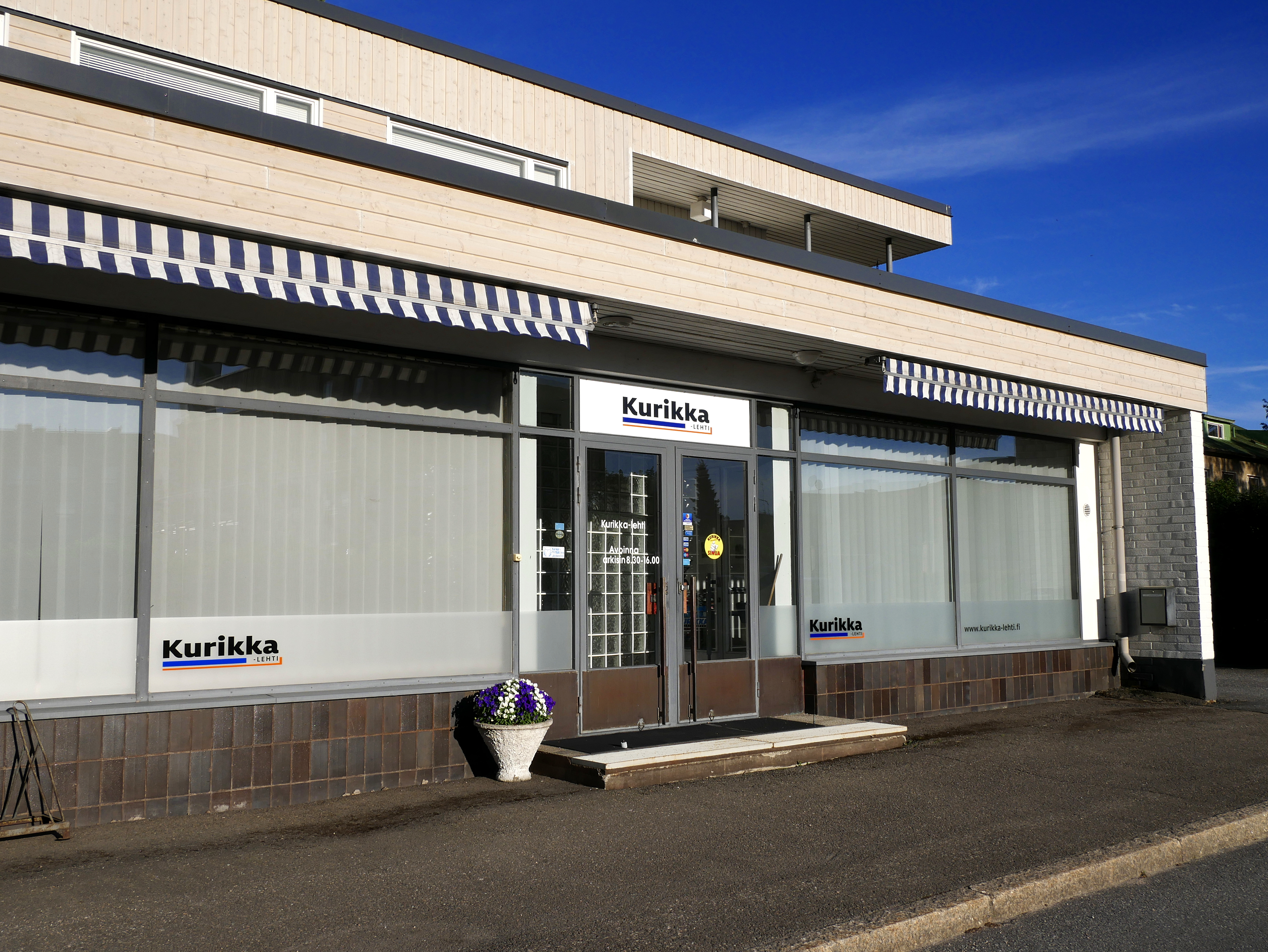 Kurikka-lehden toimitus Kurikassa.